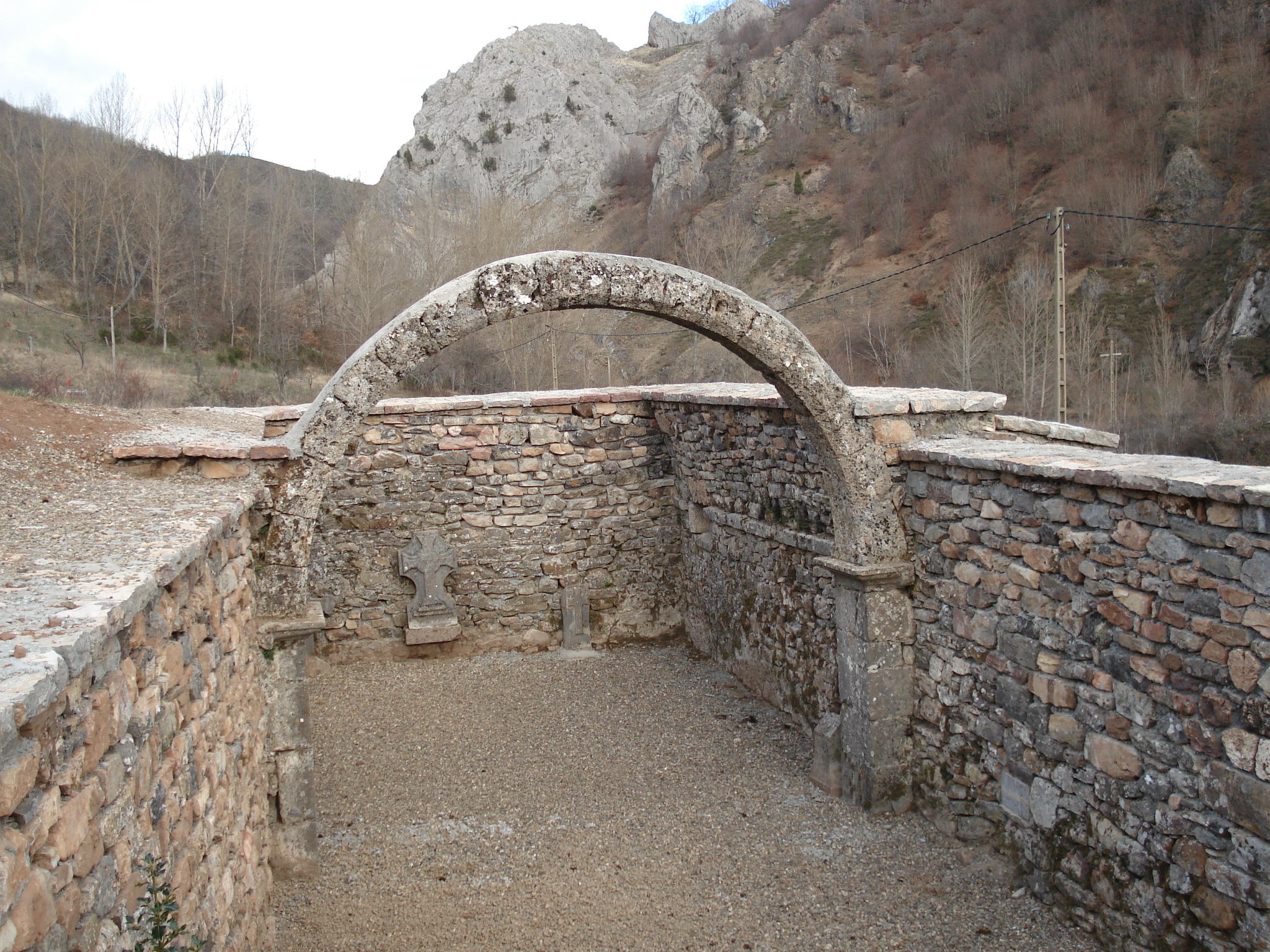 Restos del Monasterio de San Martín de Alion ,Las Salas , león